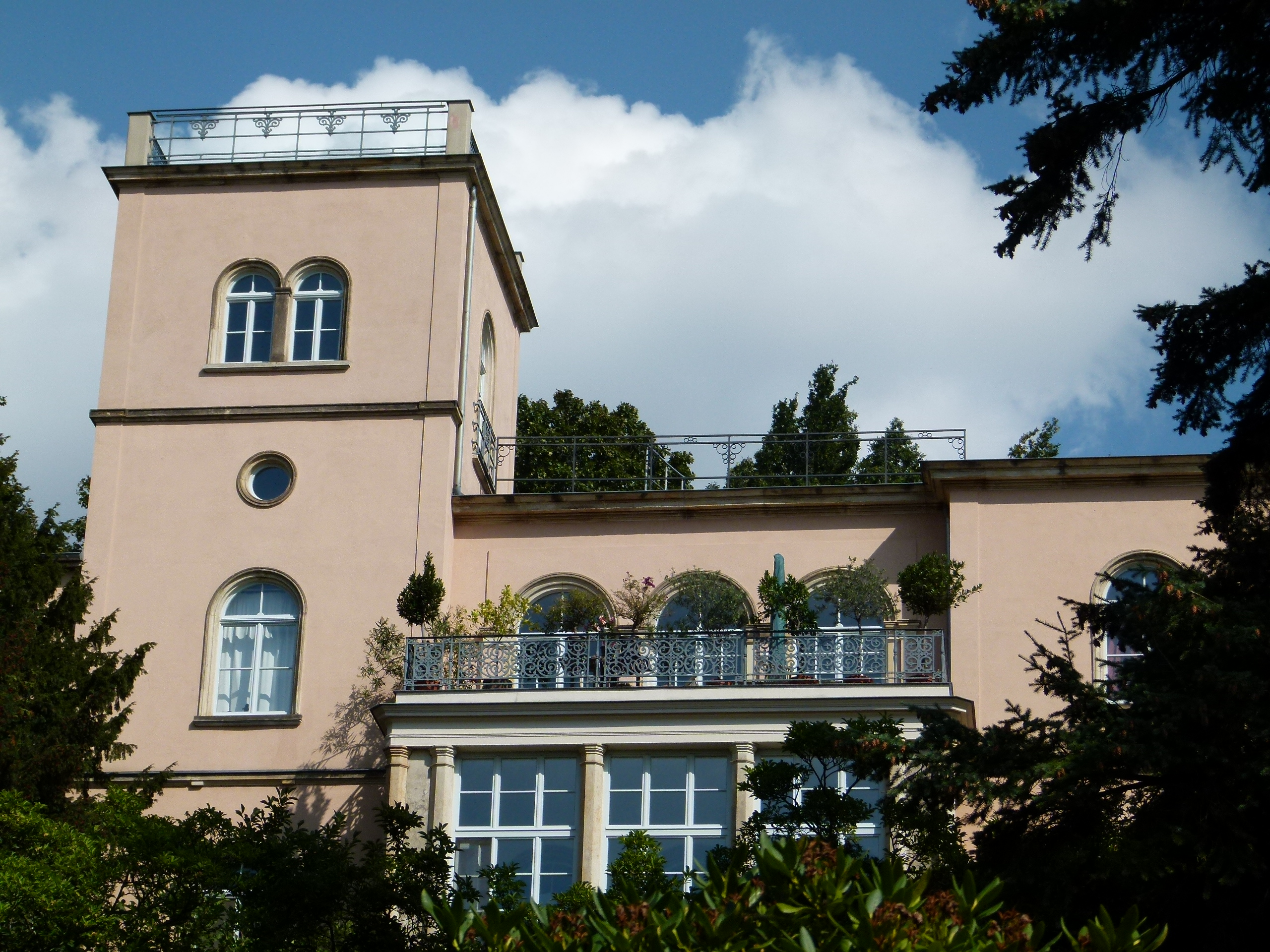 Villa Thorwald in Loschwitz, Schillerstraße 12, Dresden